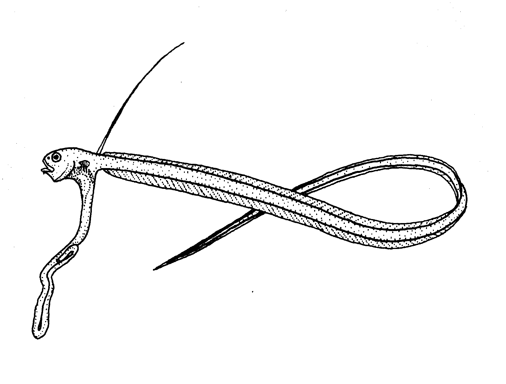 Echiodon rendahli (no common name) juvenile